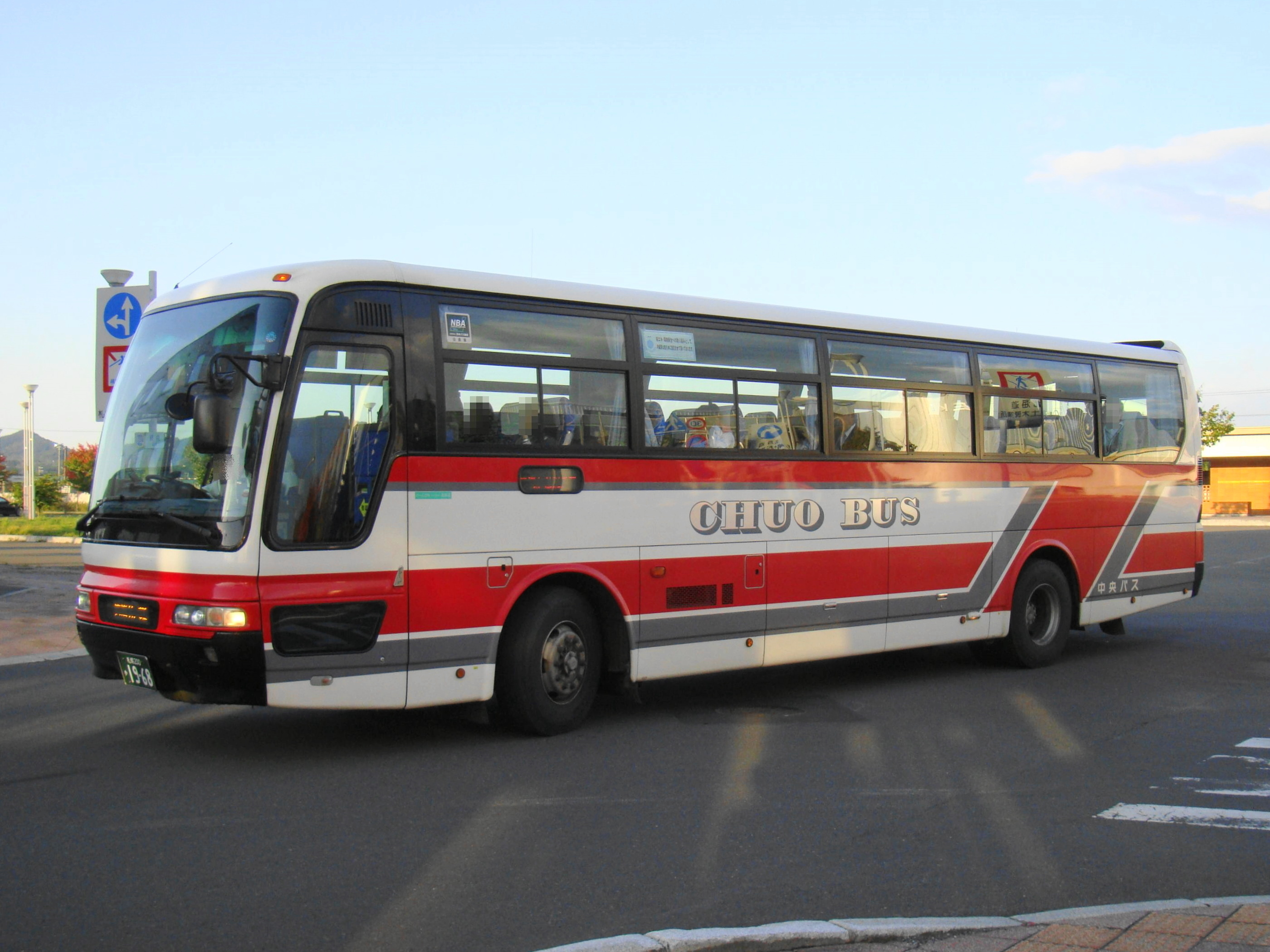 "Kōsoku Kuriyama gō" Kuriyama to Sapporo